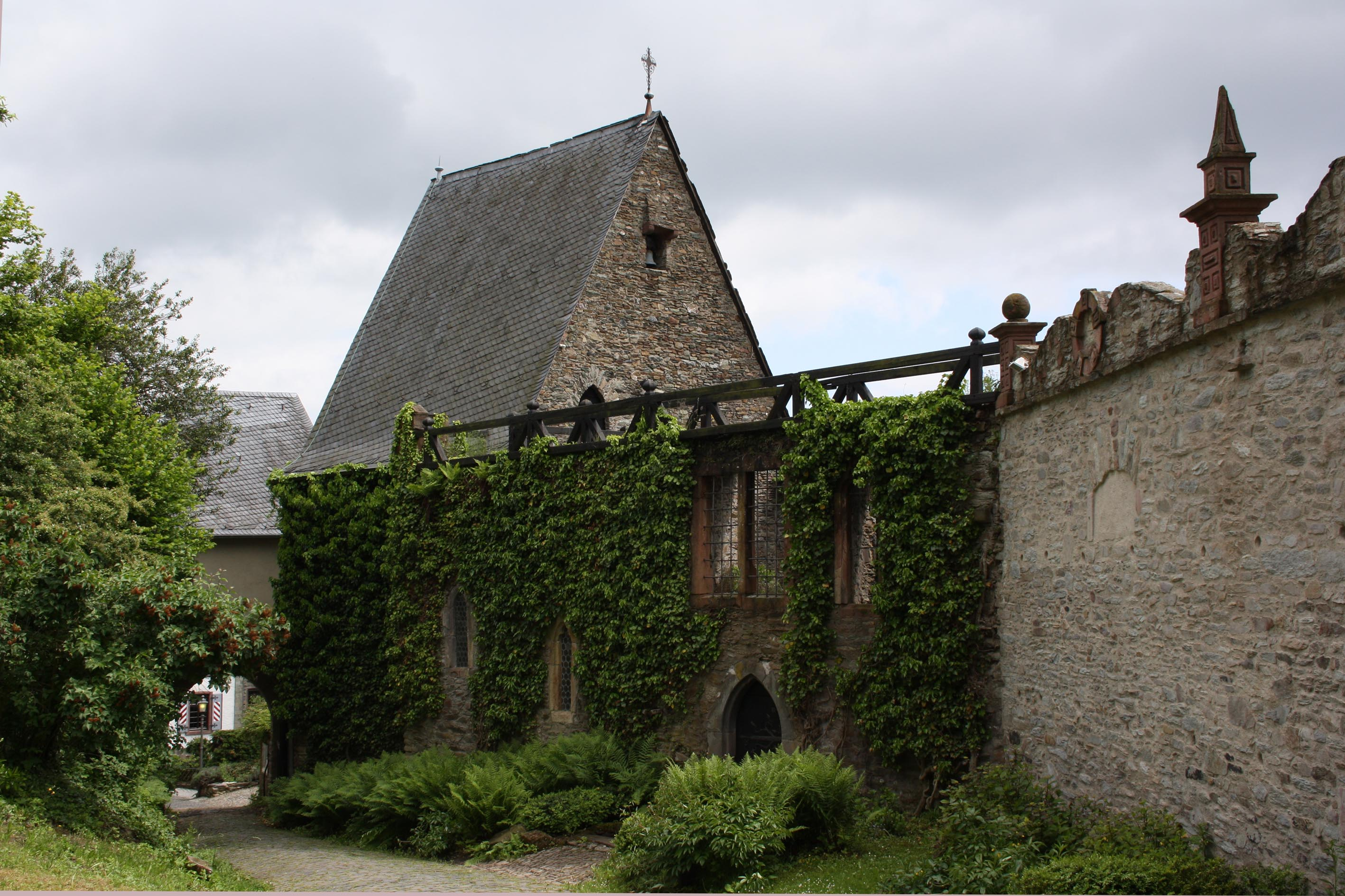 Burg Kronberg, Kapelle in der Unterburg